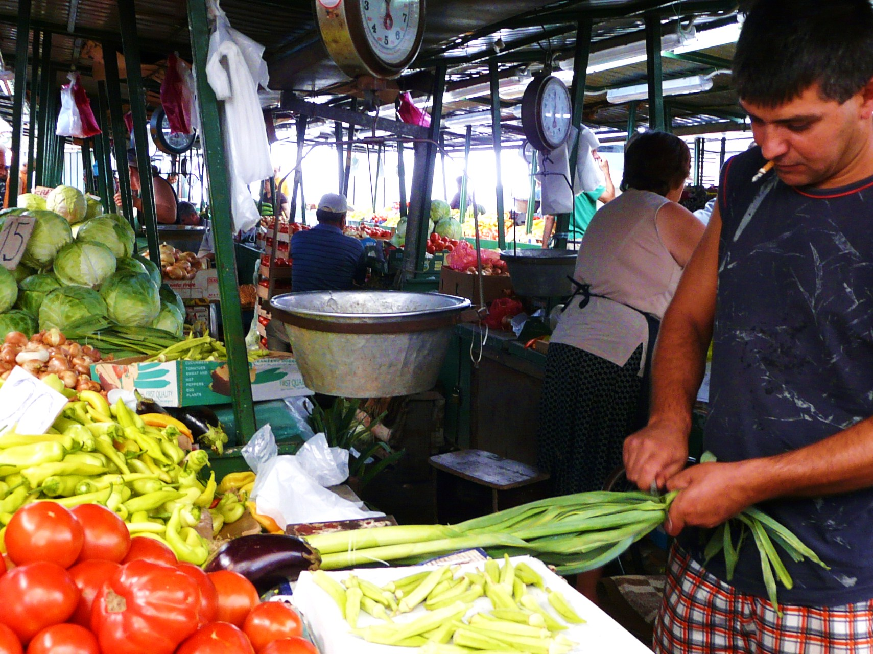 Zeleno pazarce